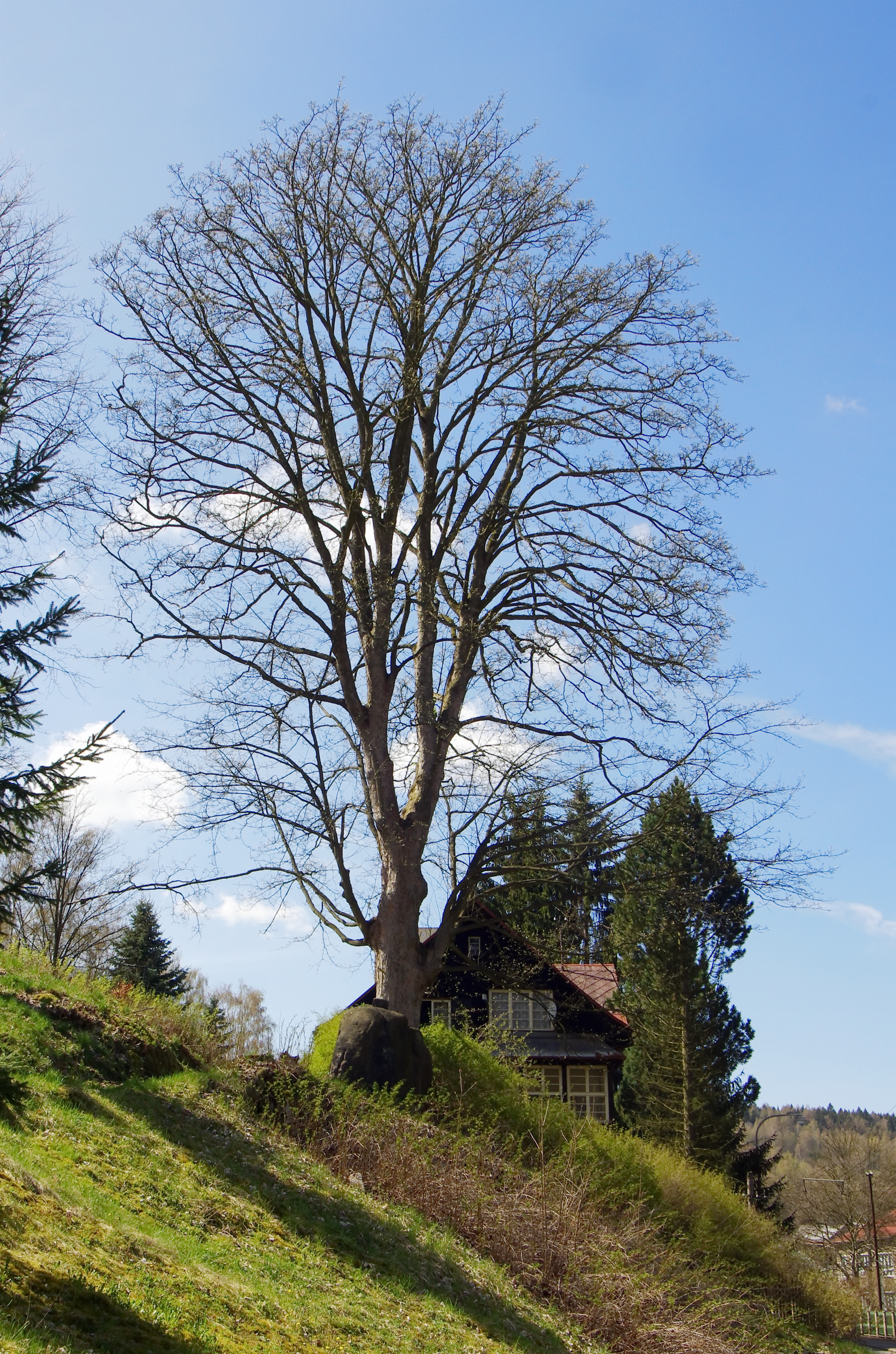 Památný strom Javor u Hanáků v Nejdku, okres Karlovy Vary